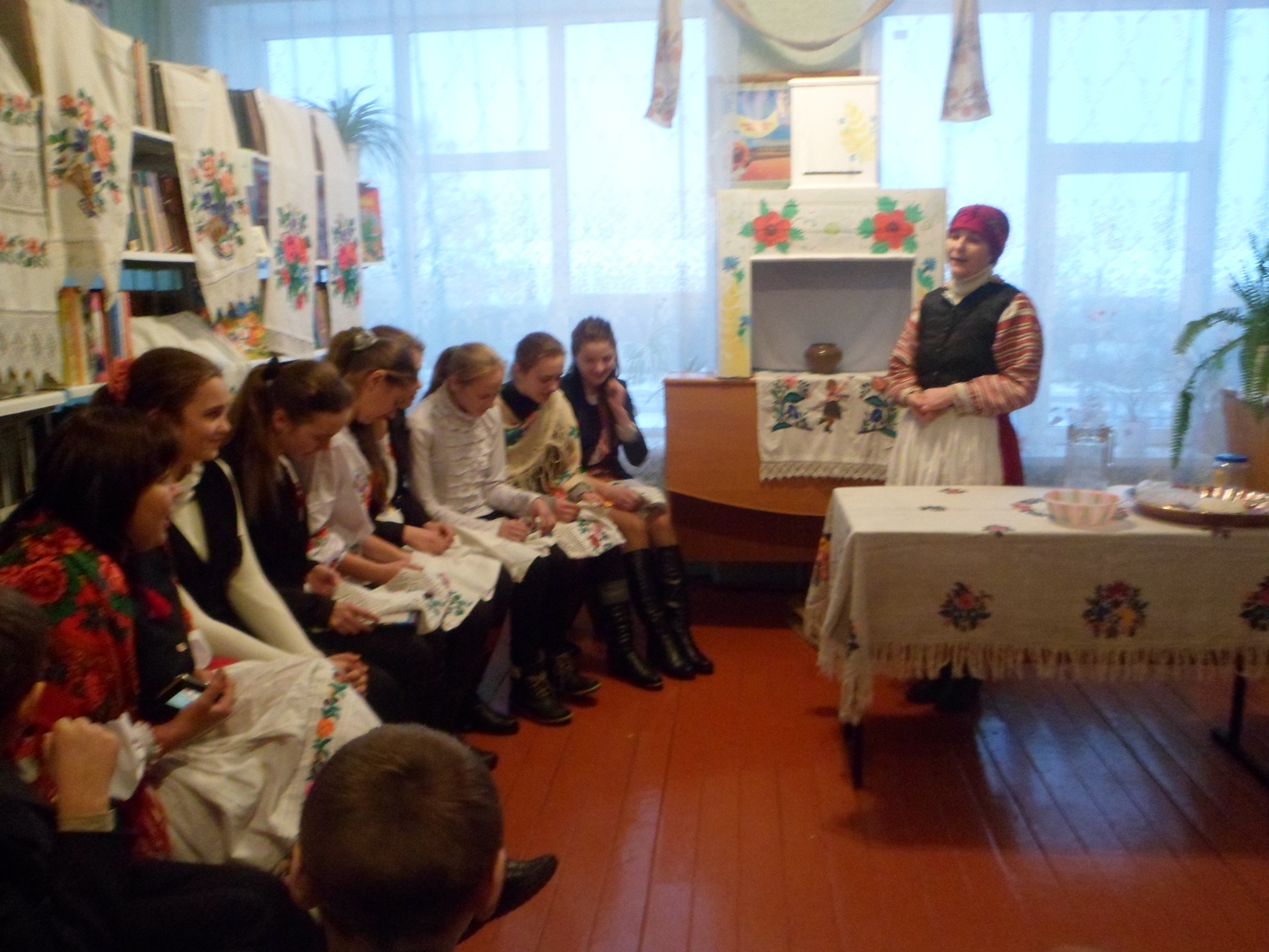 Засідання клубу 2